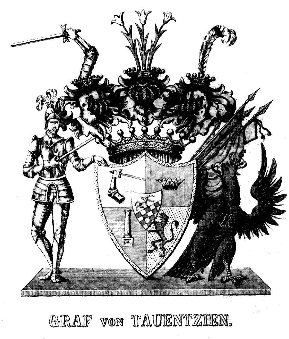 Wappen der Familie Grafen von Tauentzien.